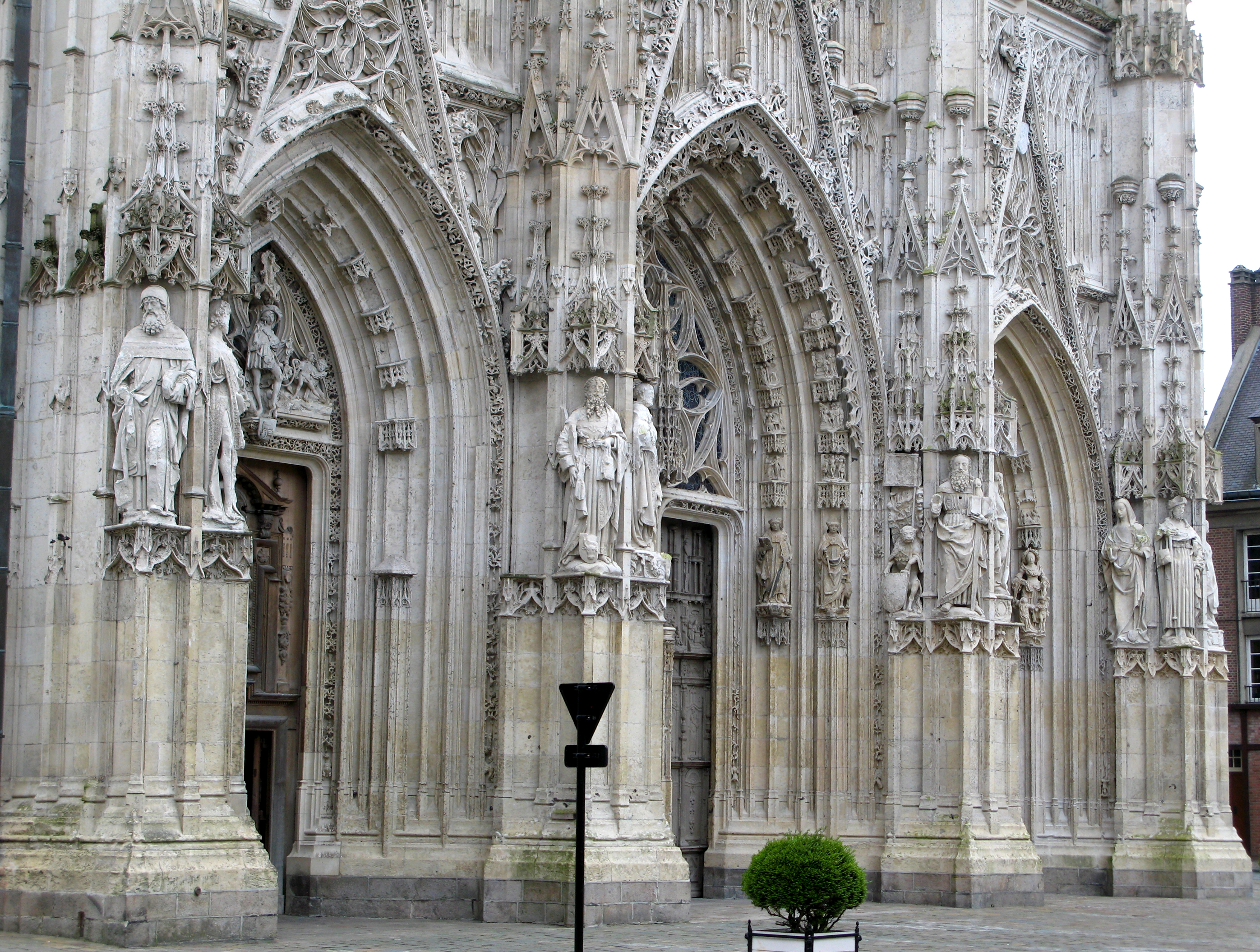 Abbeville (Somme, France) - La collégiale Saint-Wulfran. .